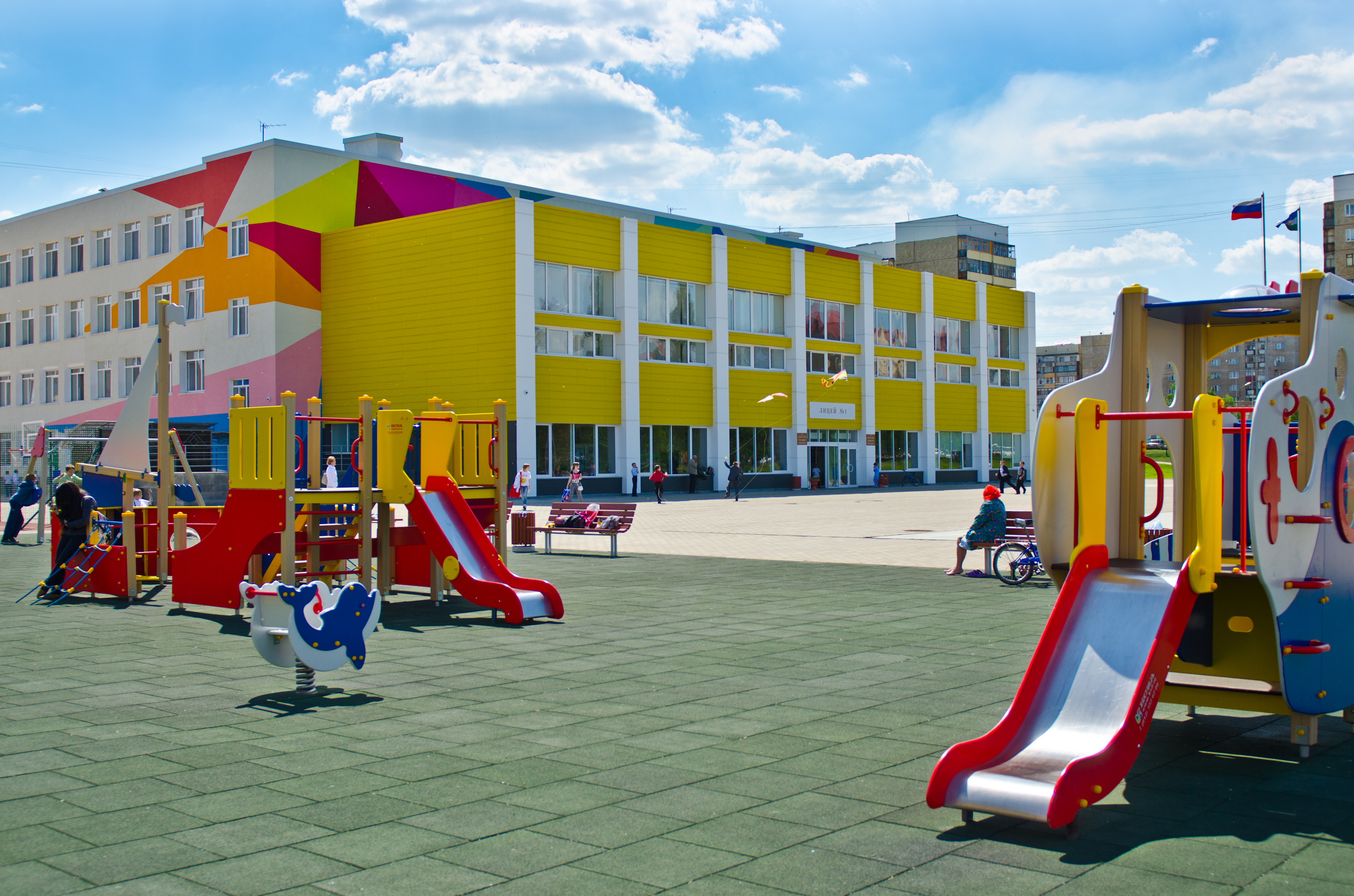 Игровая площадка Лицея, лето